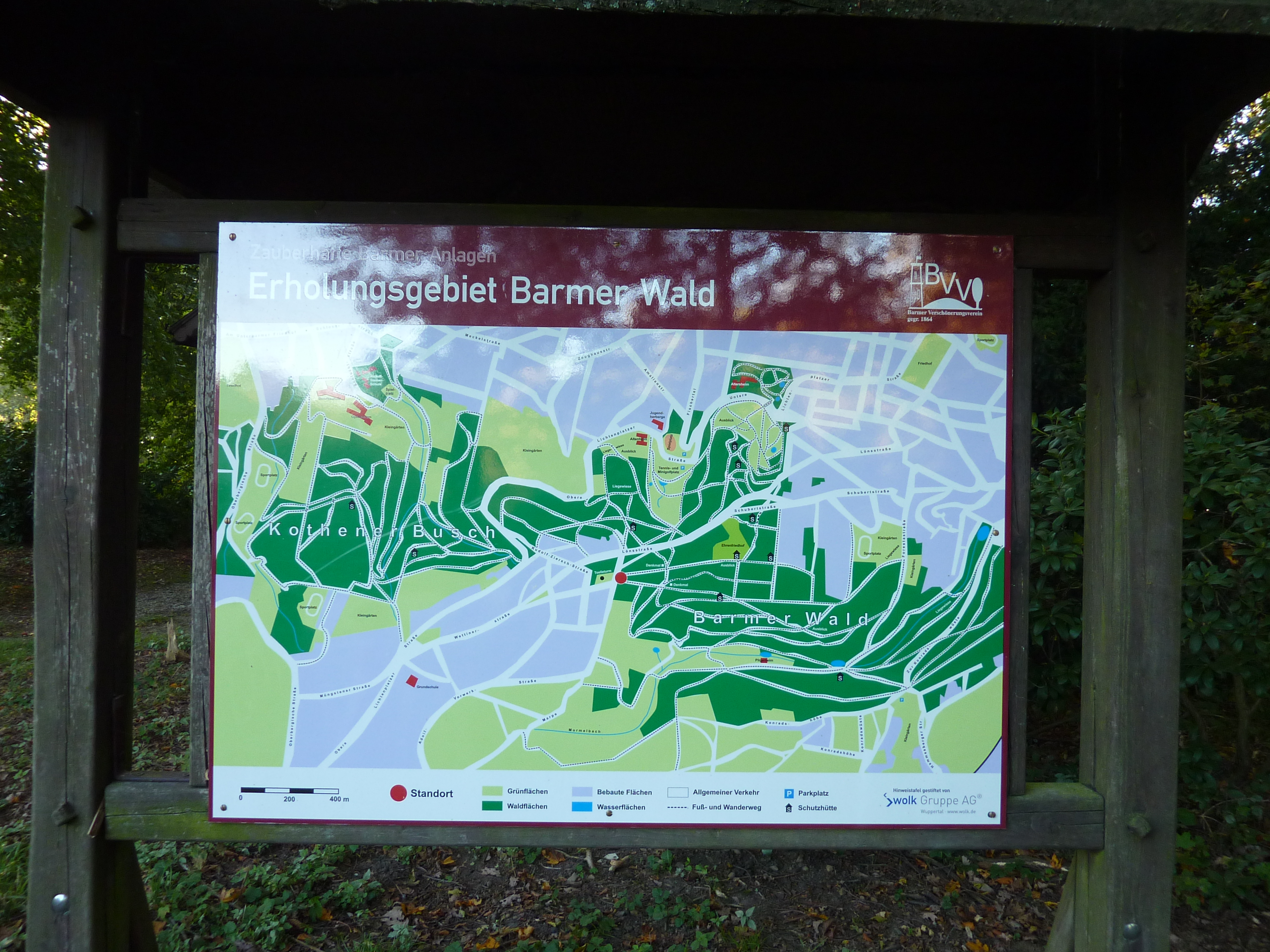 Barmer Anlagen und Wald - Übersichtskarte, Wuppertal